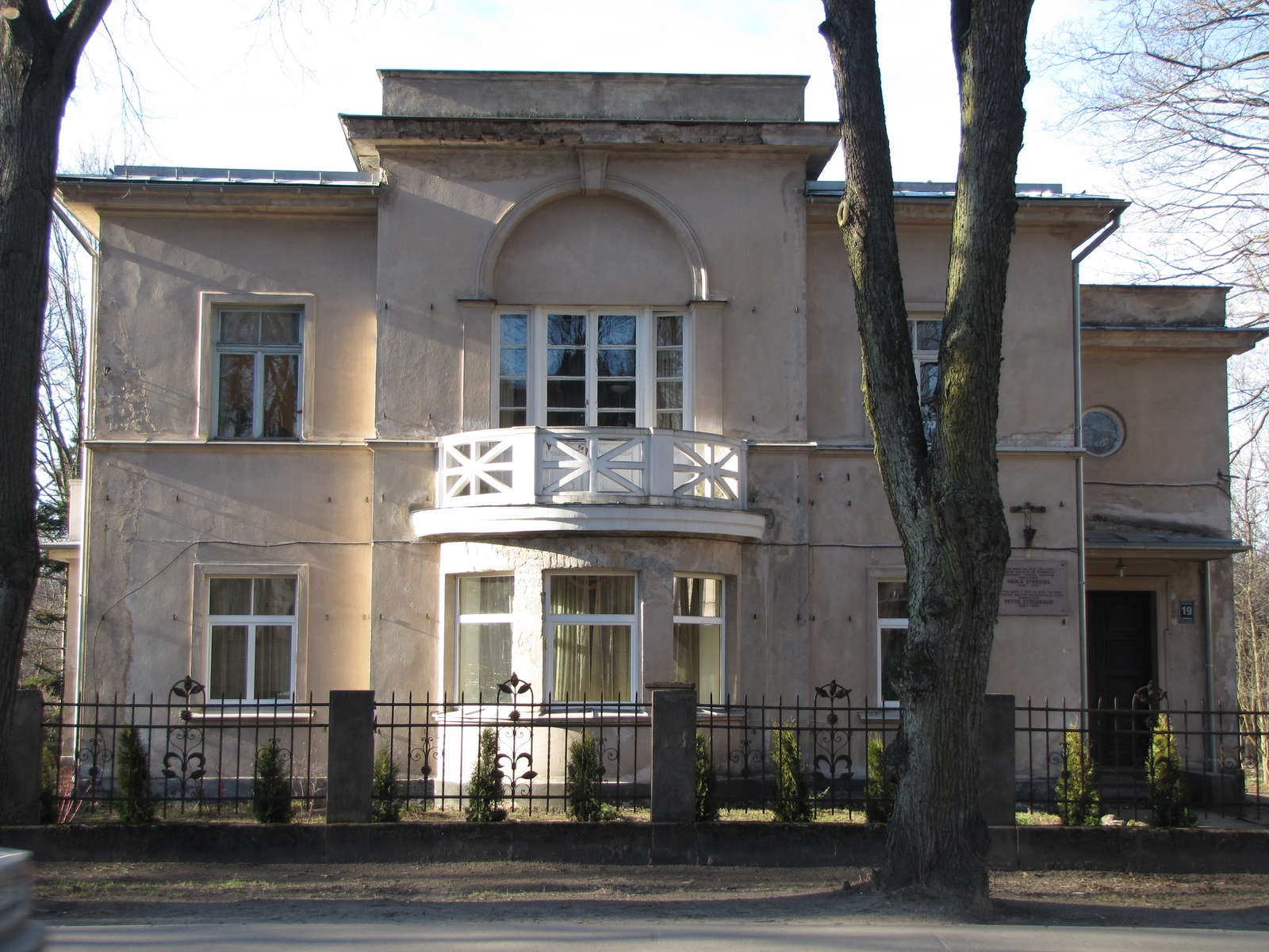 Ventspils iela, 19, Rīga. Šajā namā no 1932. gada līdz 1958. gadam dzīvoja un strādāja medicīnas zinātņu doktors profesors Pauls Stradiņš (1896-1958).